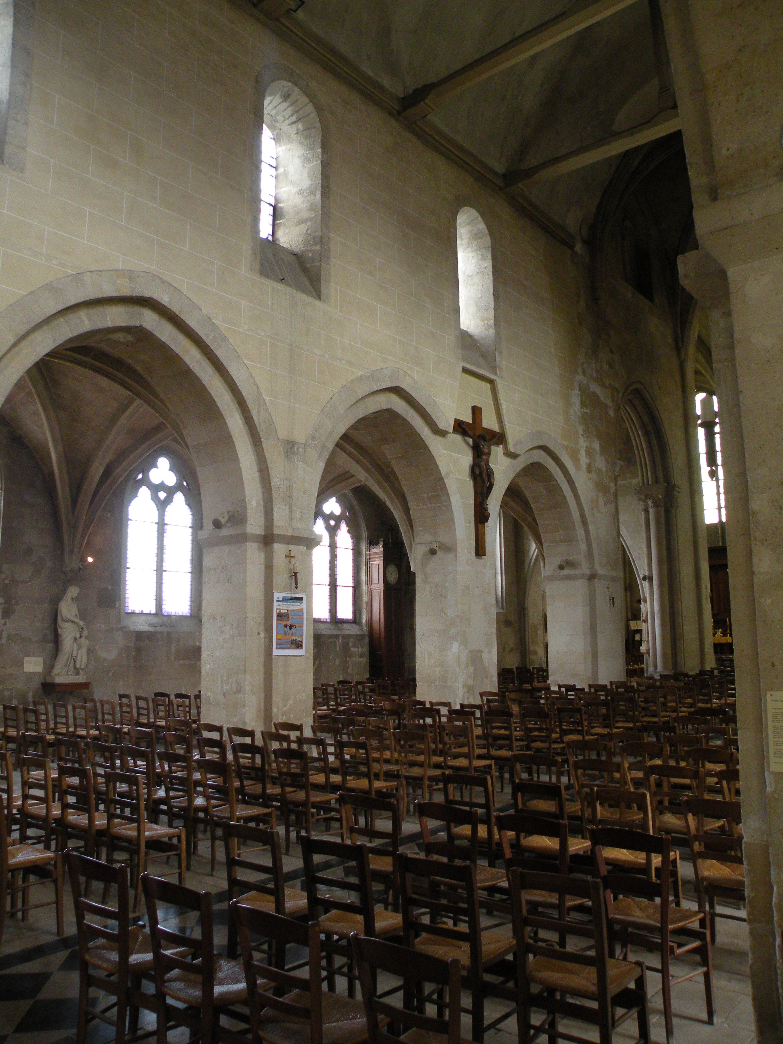 nef Église Saint-Denis, Crépy-en-Valois